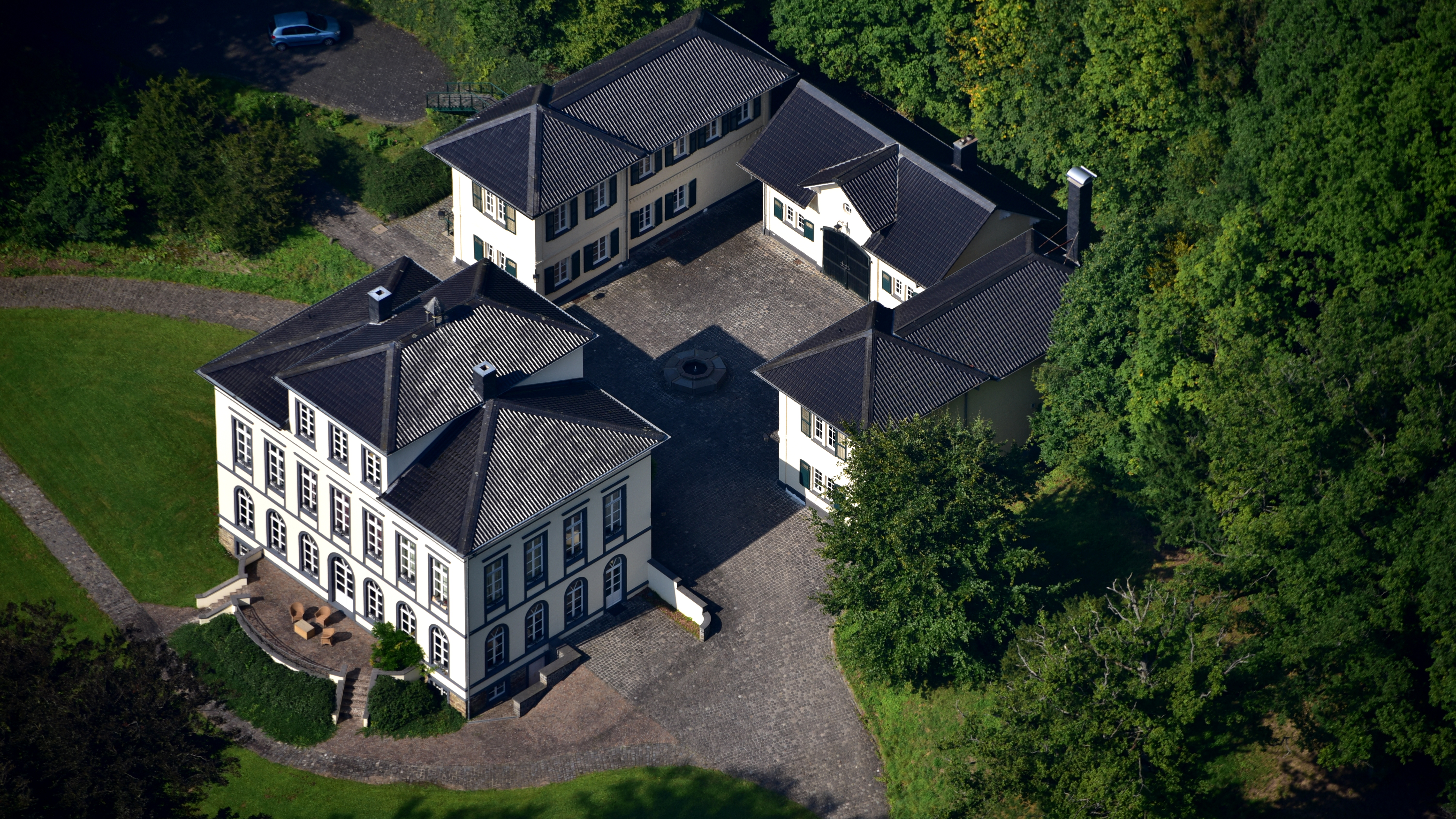 Schloss Rennenberg, Luftaufnahme (2017)